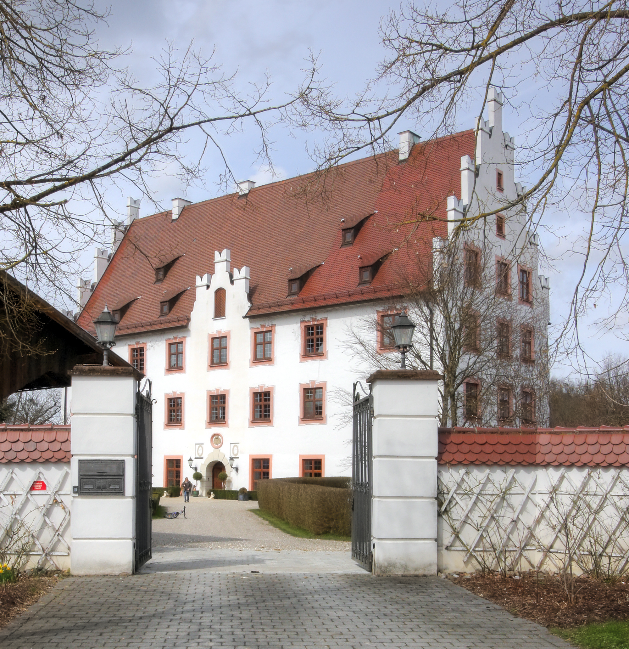 Jettingen-Scheppach, Gemarkung Eberstall, ehem. Schloss der Freiherren vom Stain